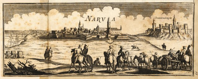 Scan from Johann Christoph Brotze's book Sammlung verschiedner Liefländischer Monumente. Narva [Ivannogorod; die Gravüre].